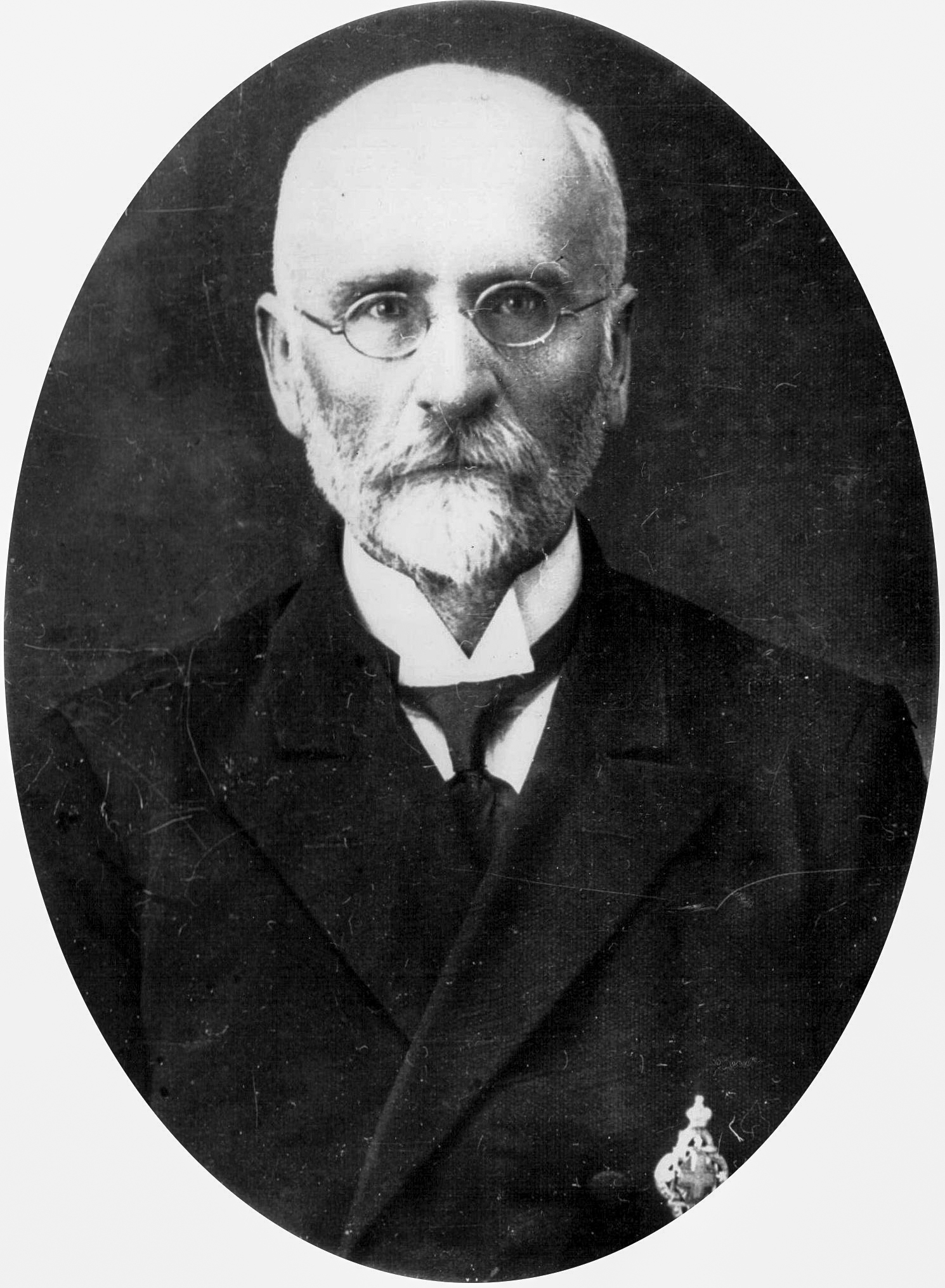 Mychajło Petrowycz Kobryn.